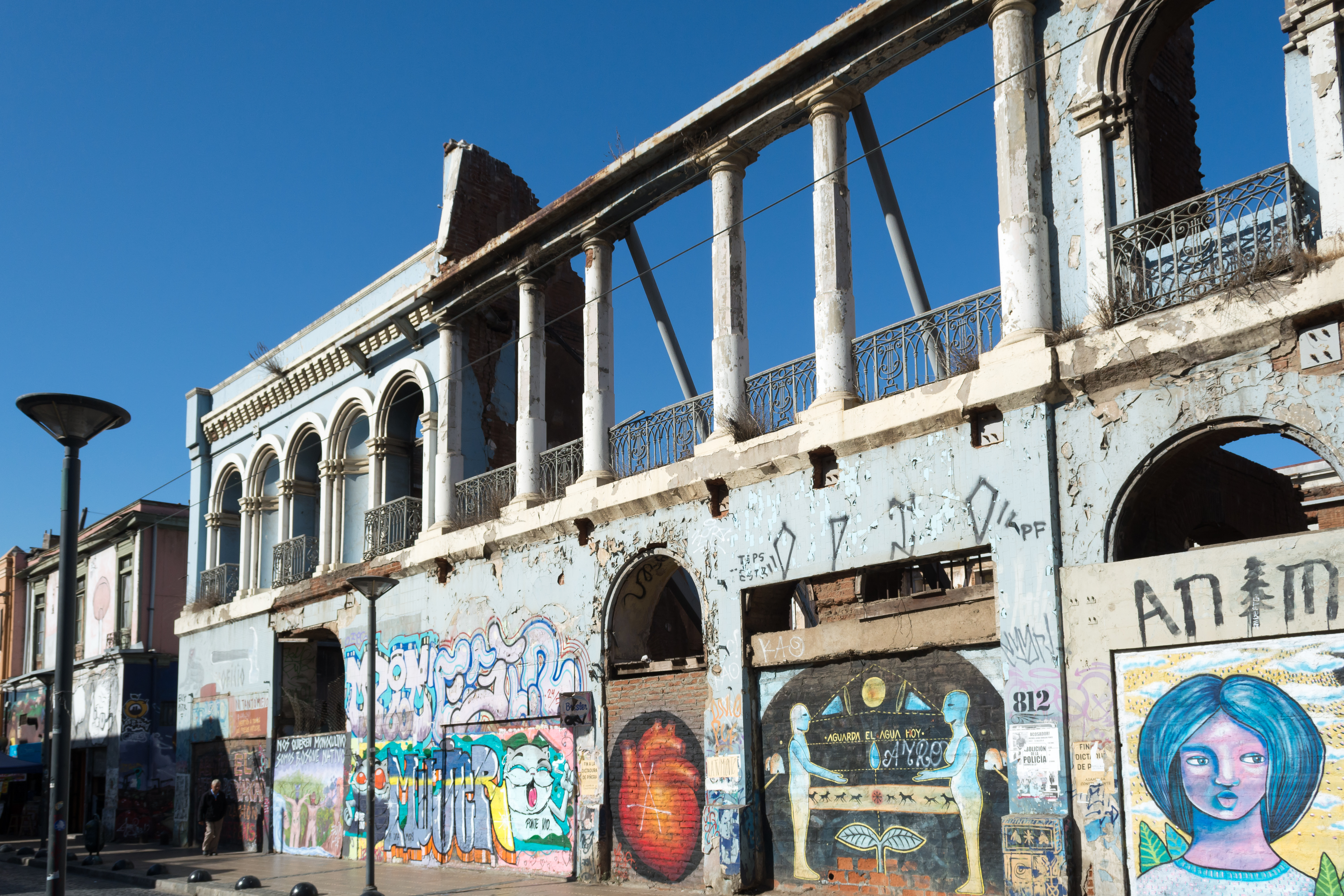 Palacio Subercaseaux, Valparaíso, Región de Valparaíso, Chile